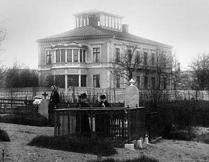 Bünsowska villan vid Bünsowska tjärn, Sundsvall. I förgrunden gamla kyrkogården (nu borta).